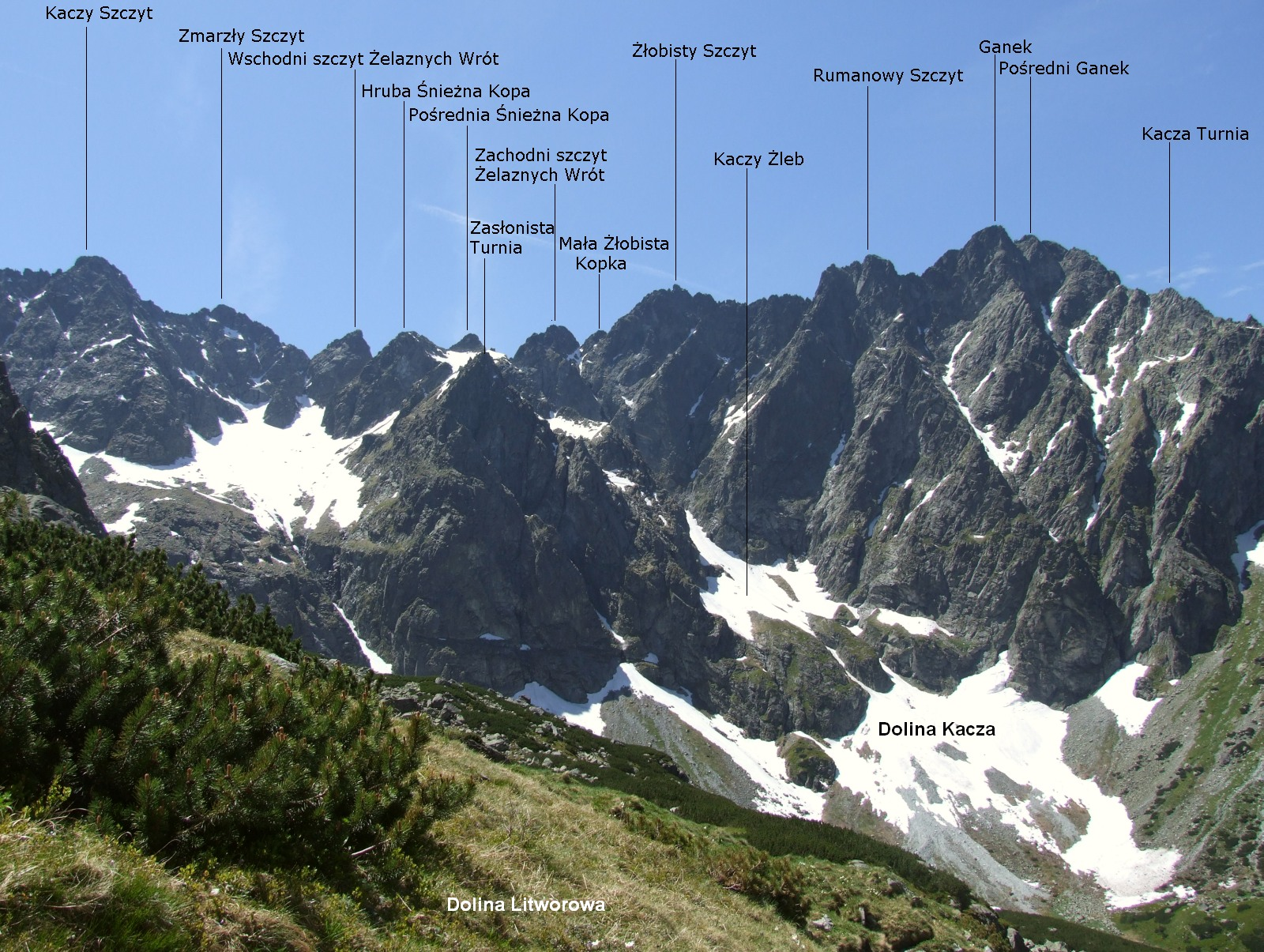 Dolina Kacza, widok z Doliny Litworowej